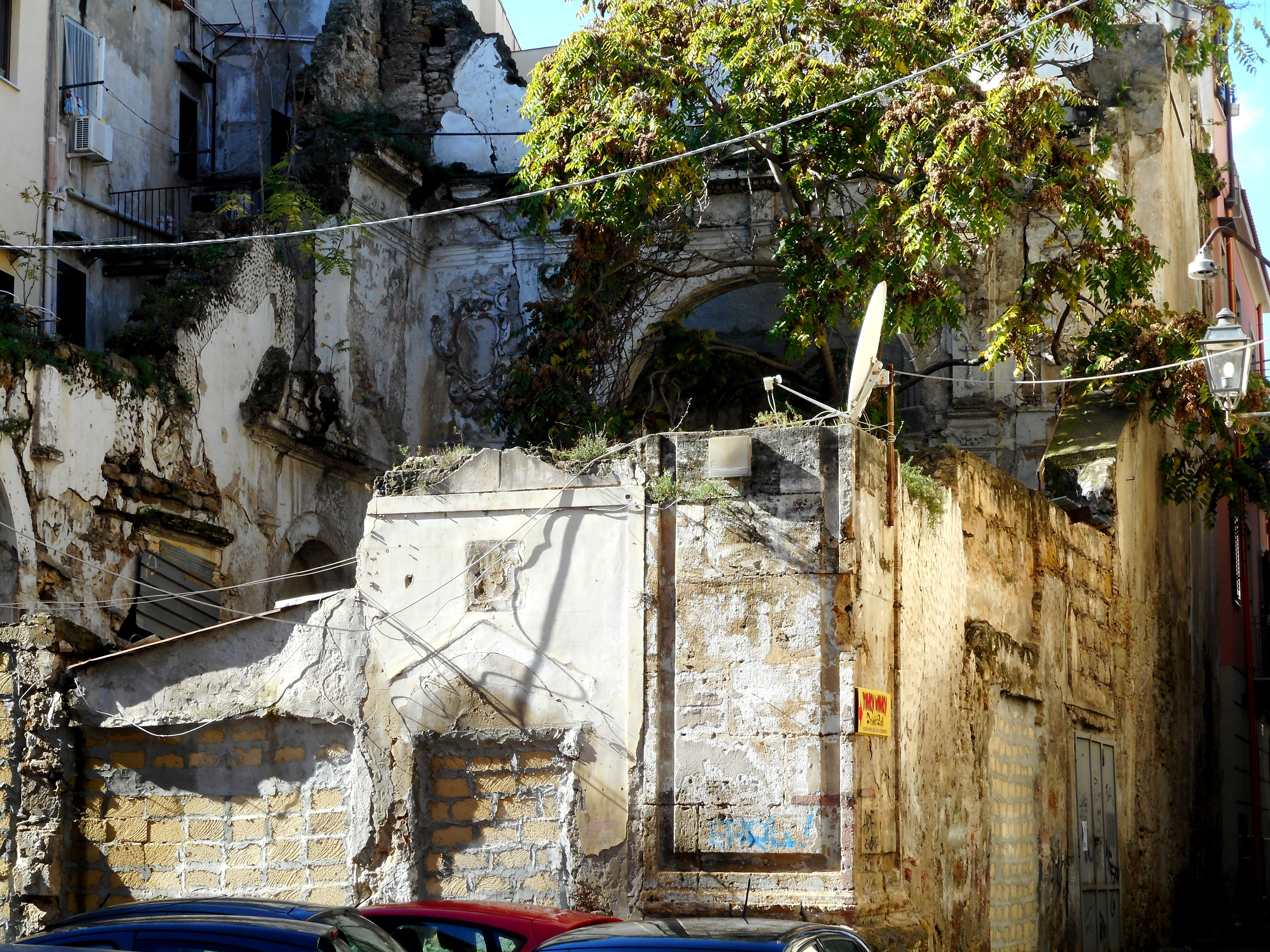 Ruderi della chiesetta della Madonna delle Grazie dei Macellai